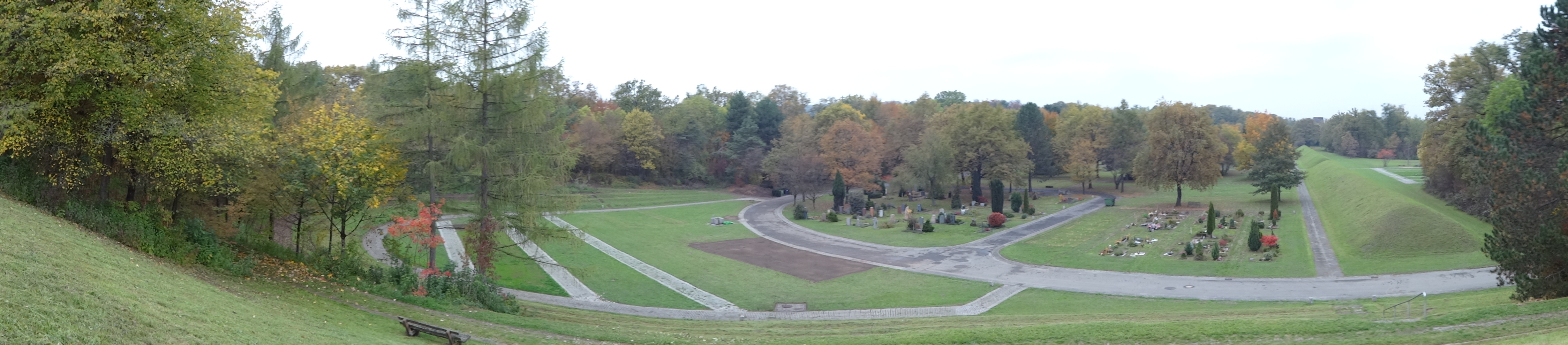 Dornhaldenfriedhof in Stuttgart-Degerloch, unter anderem mit dem Grab von Andreas Baader, Gudrun Ensslin und Jan-Carl Raspe